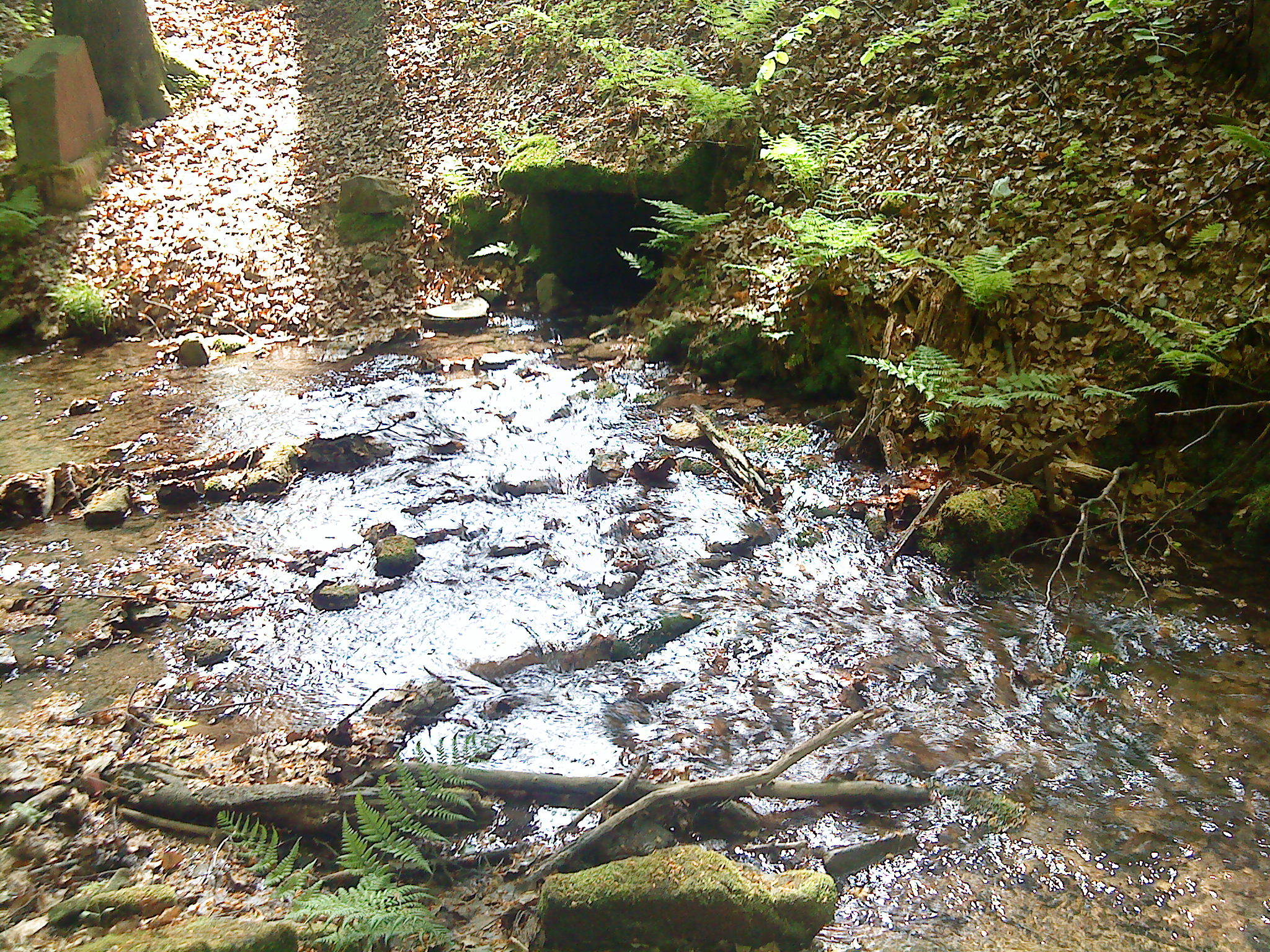 Die Aschaffquelle hinter Waldaschaff